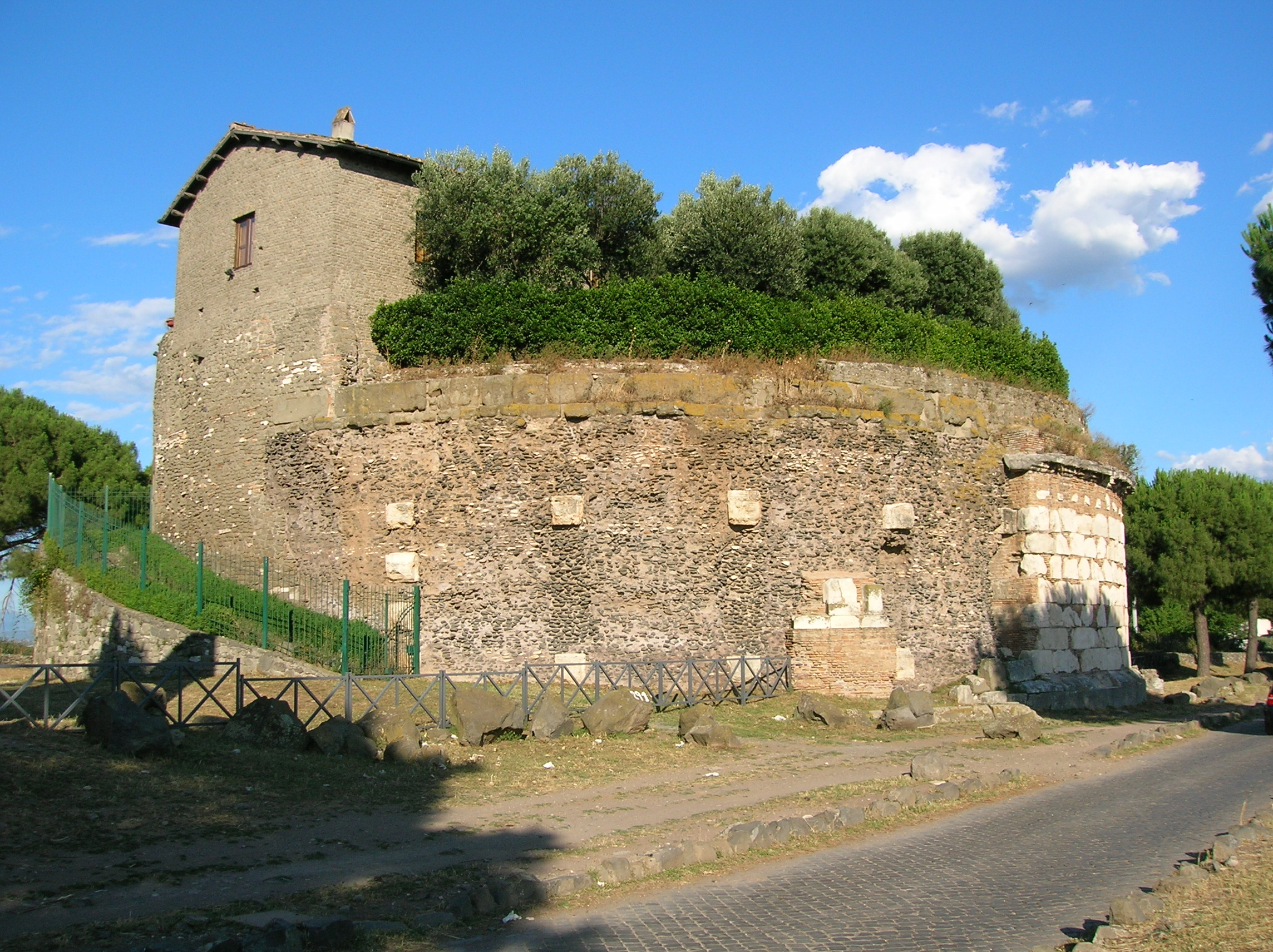 Appia antica, casolare su mausoleo di età romana